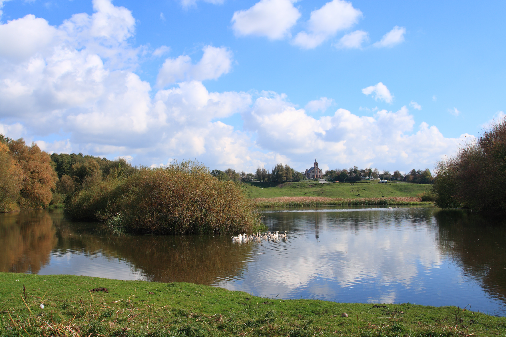 Село Новоселиця. Північна частина села поблизу парку.